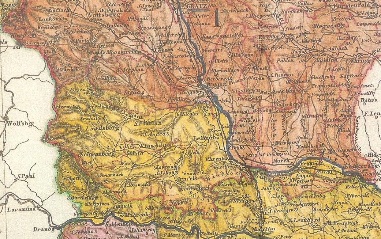 Gebietsverschiebung zwischen dem Marburger und dem Grazer Kreis des Erzherzogtums Steiermark nach 1850.